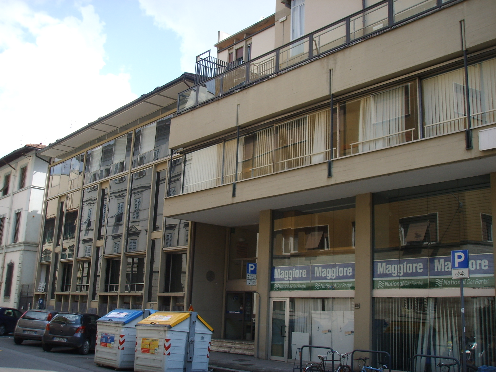 Sede aci